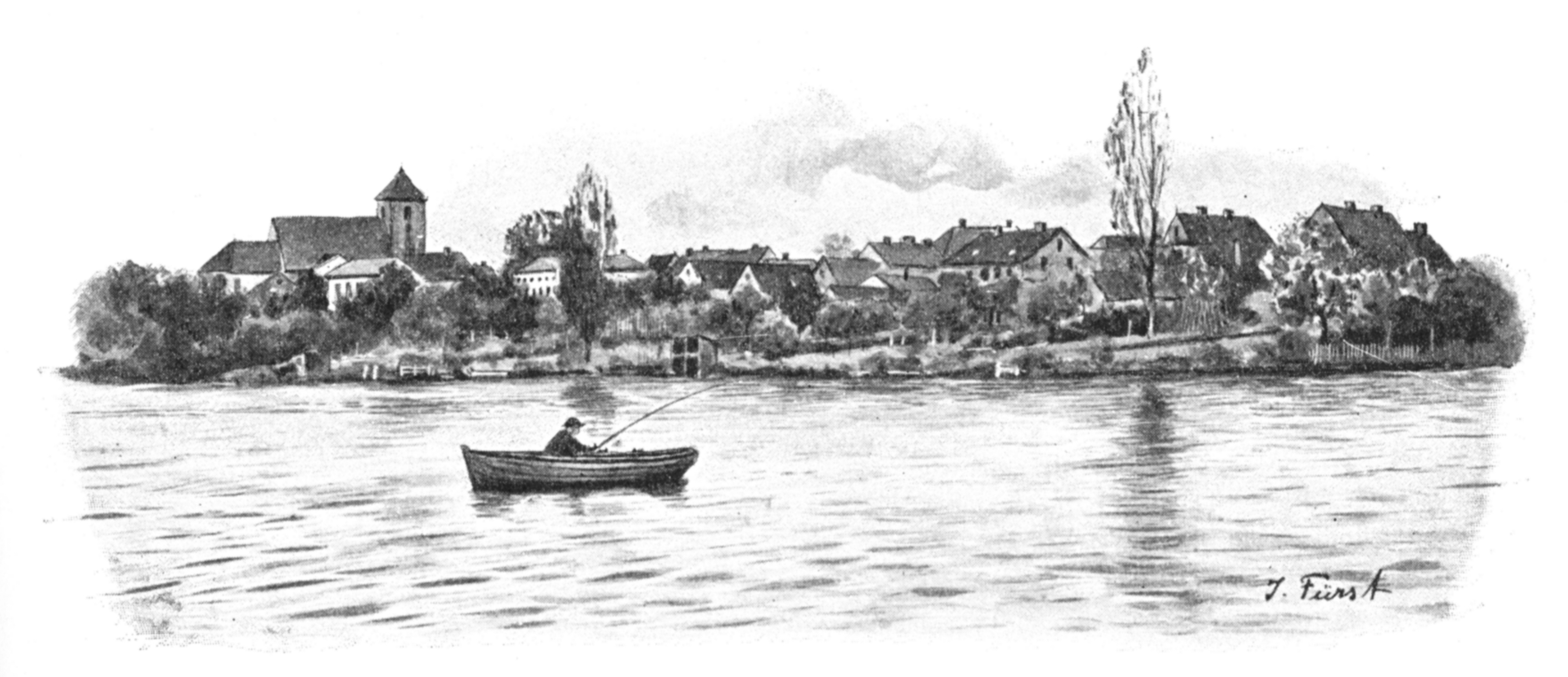 Blick auf Preetz um 1895, gezeichnet von Julius Fürst